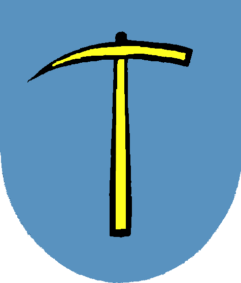 Herb Łazów w powiecie bielskim, gminie Jasienica